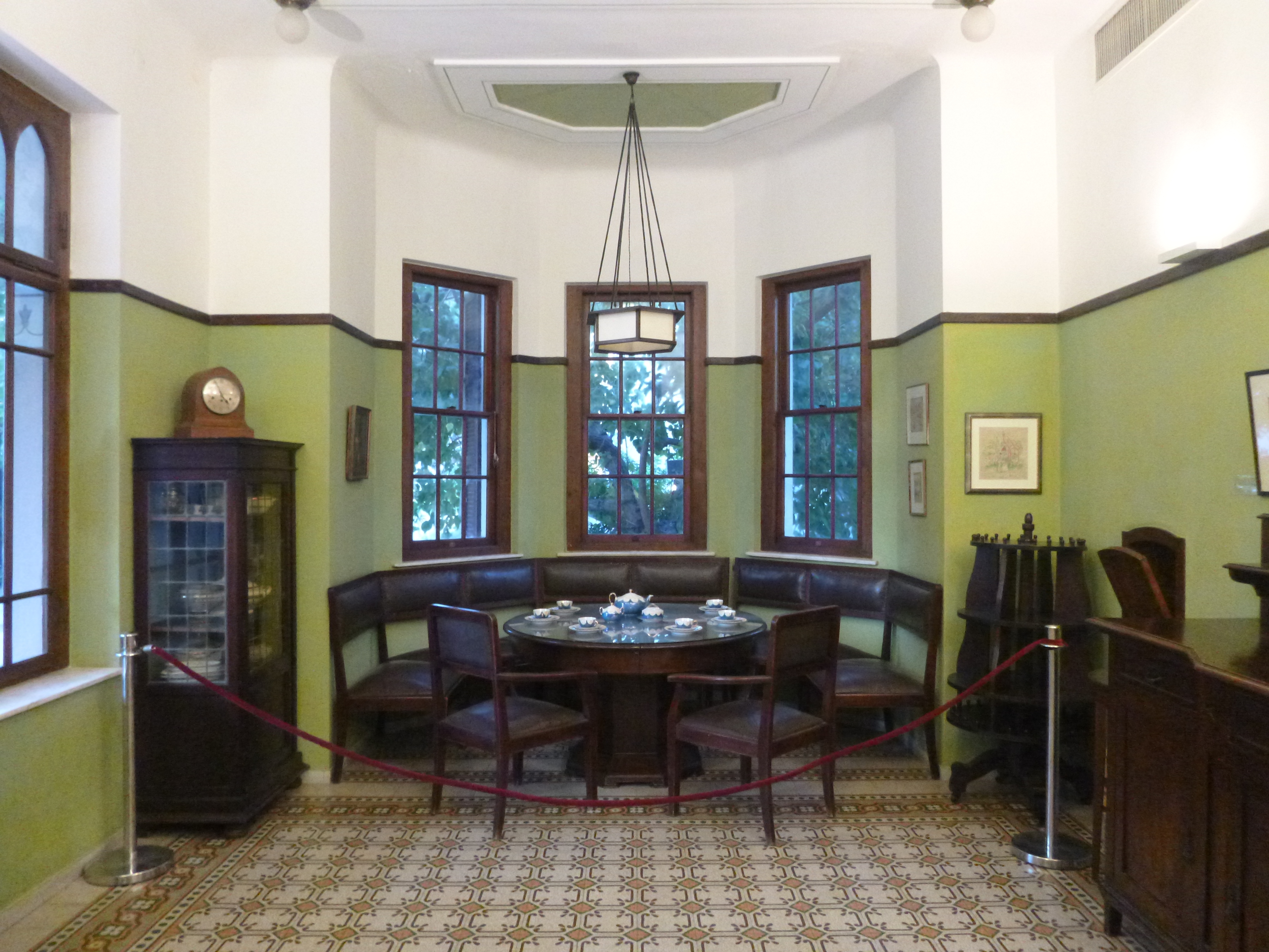 Das Speisezimmer des Dichters Chaim Nachman Bialik in seinem Haus in Tel Aviv.